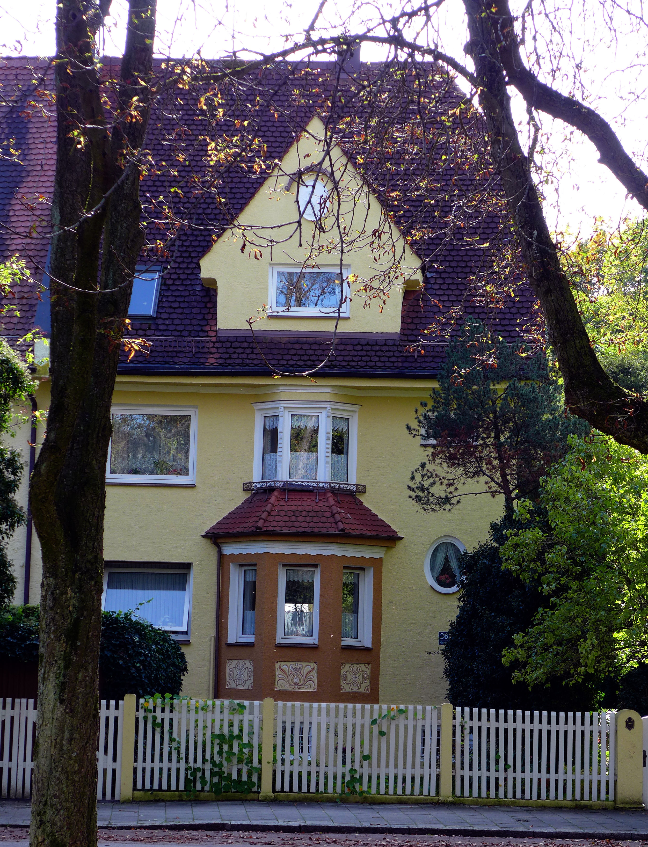 Marsopstr 26, München